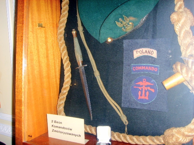 Eksponaty Instytutu im. Sikorskiego w Londynie